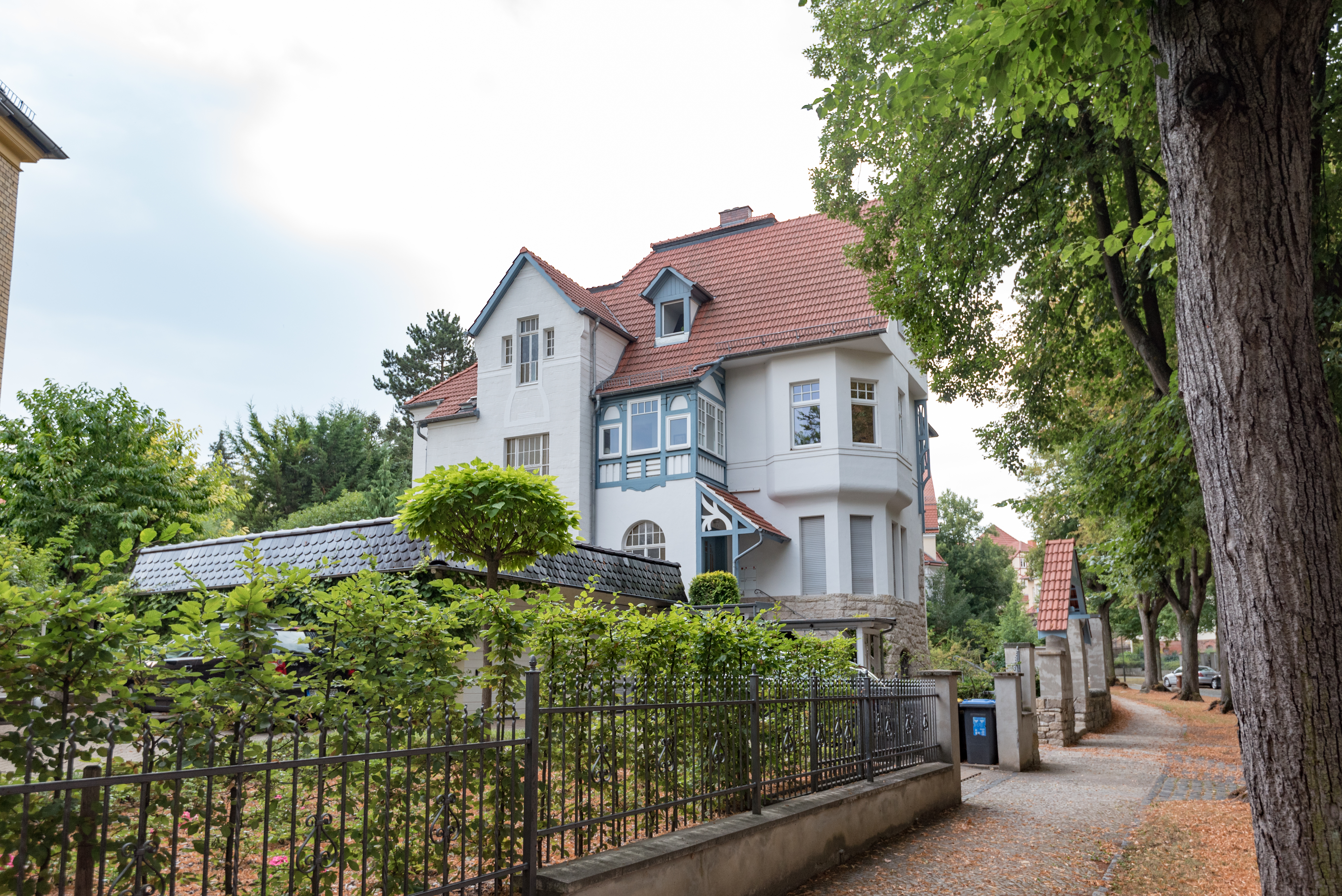 Naumburg (Saale), Buchholzstraße 14